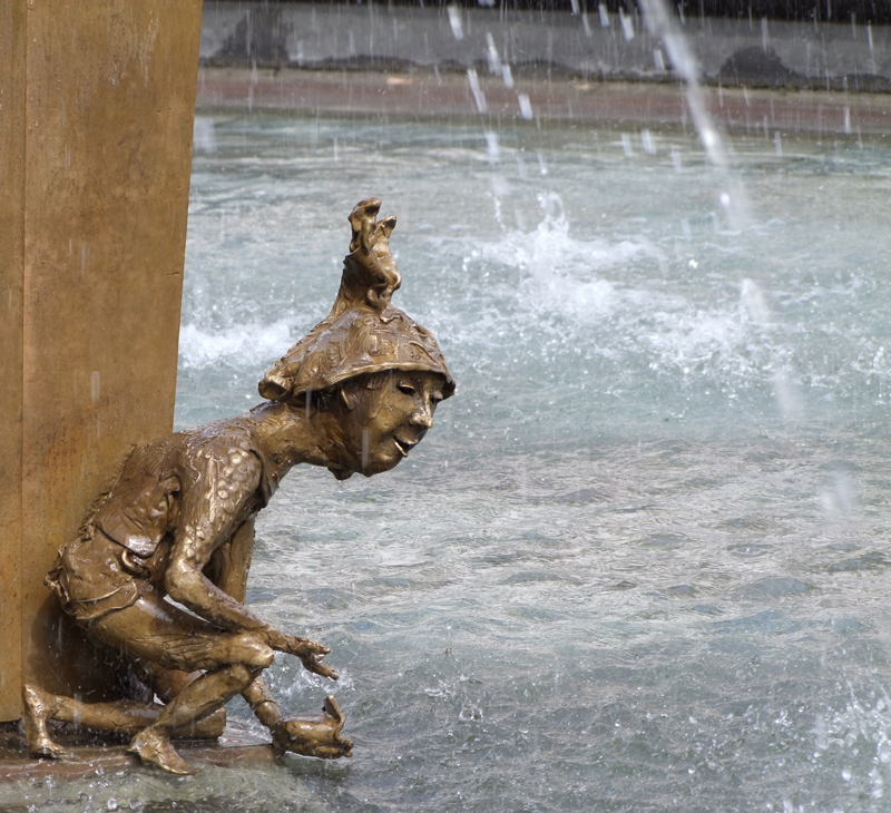 Der Geldbeutelwäscher hier eine von über 200 Figuren am Fastnachtsbrunnen (Mainz)